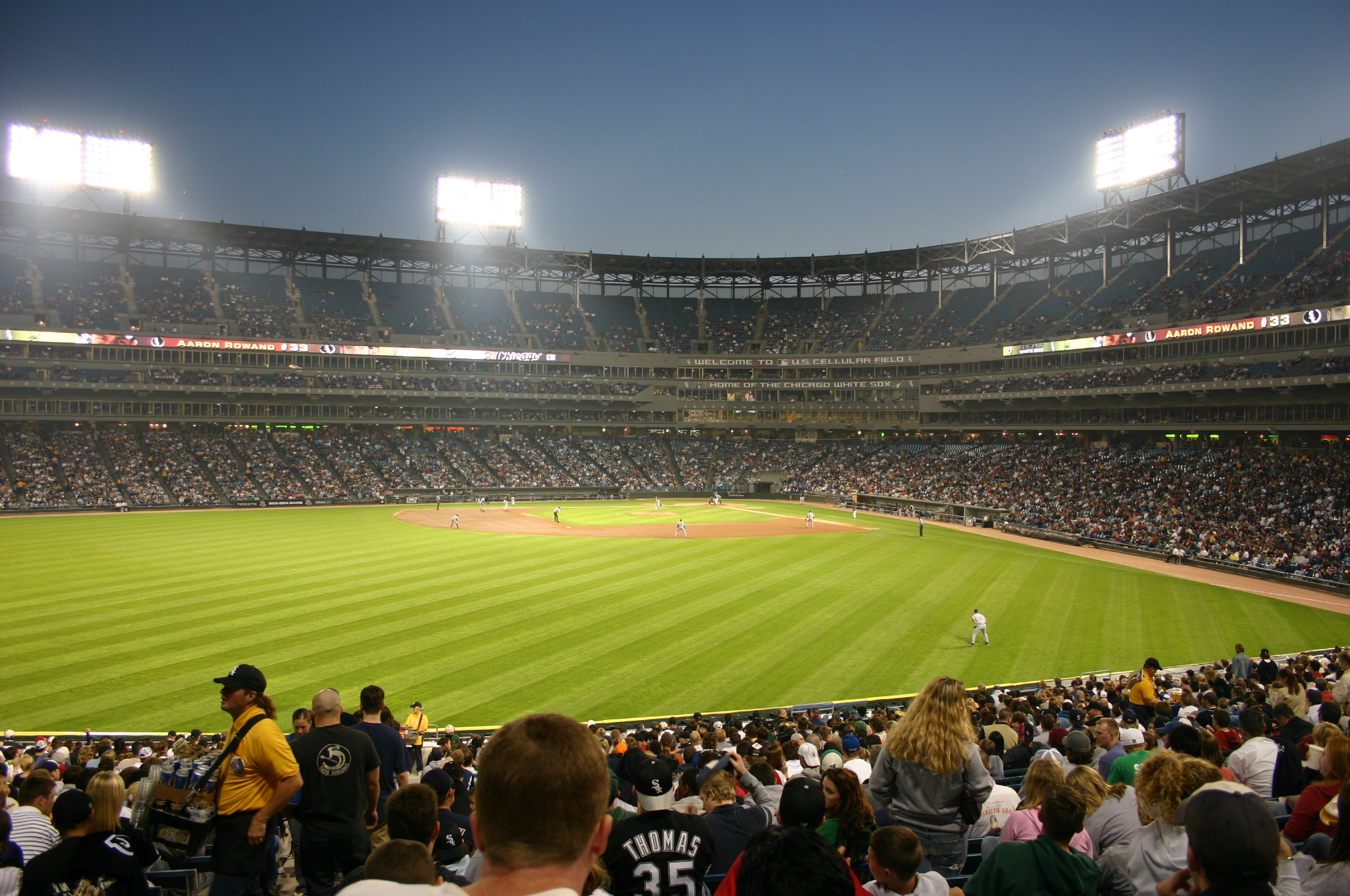 U.S. Cell während eines Spiels